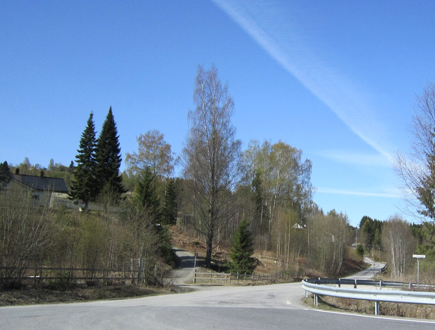 Hanssveavegen, en gren av fylkesvei 2418 ned mot riksvei 4